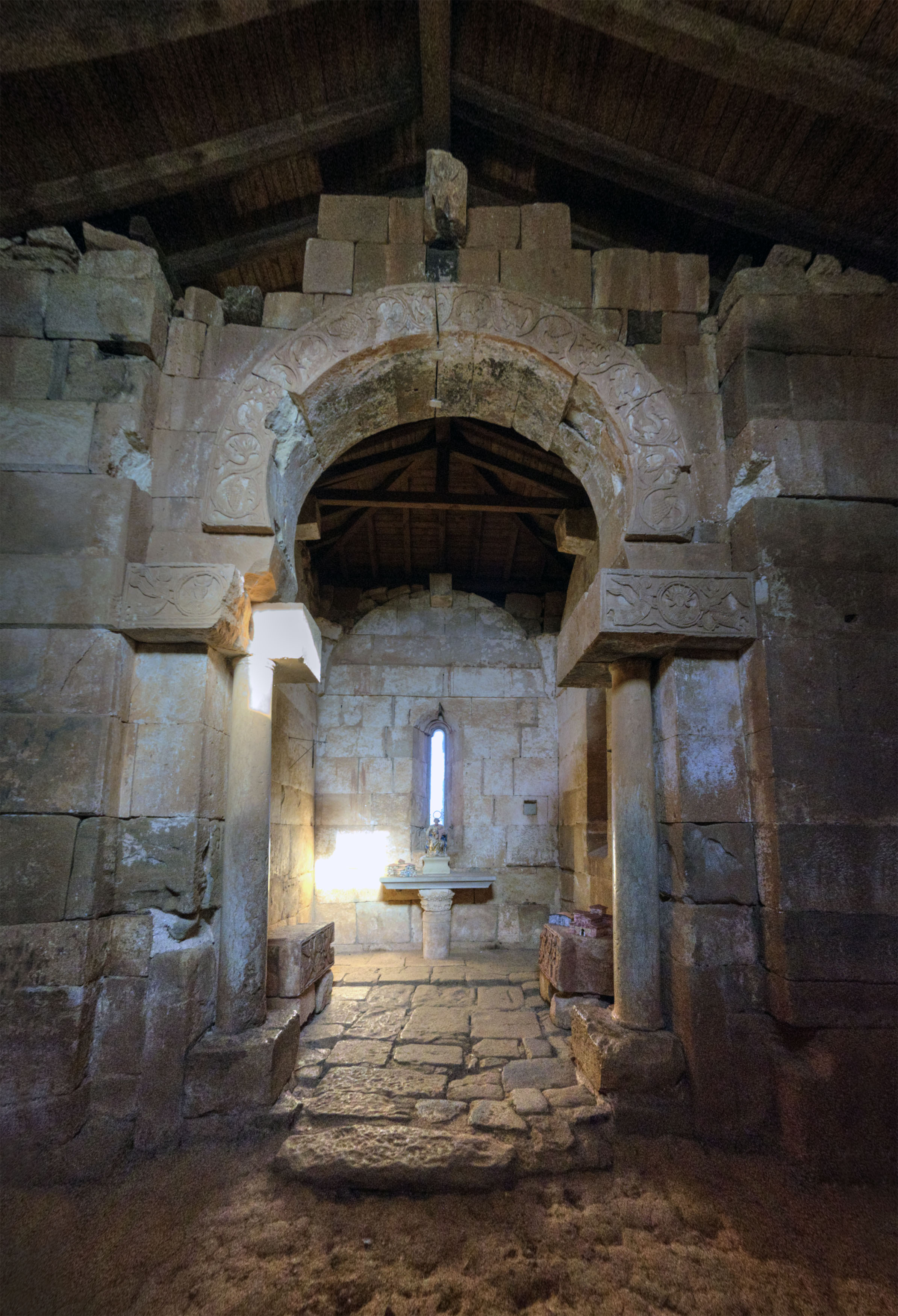 Ermita de origen visigodo localizada en la afueras de Quintanilla de las Viñas, provincia de Burgos. Su origen se fecha en los siglos VII-VIII y actualmente sólo queda una parte de la edificación original con elementos decorativos tallados en grandes sillares, tanto en el interior como en el exterior.